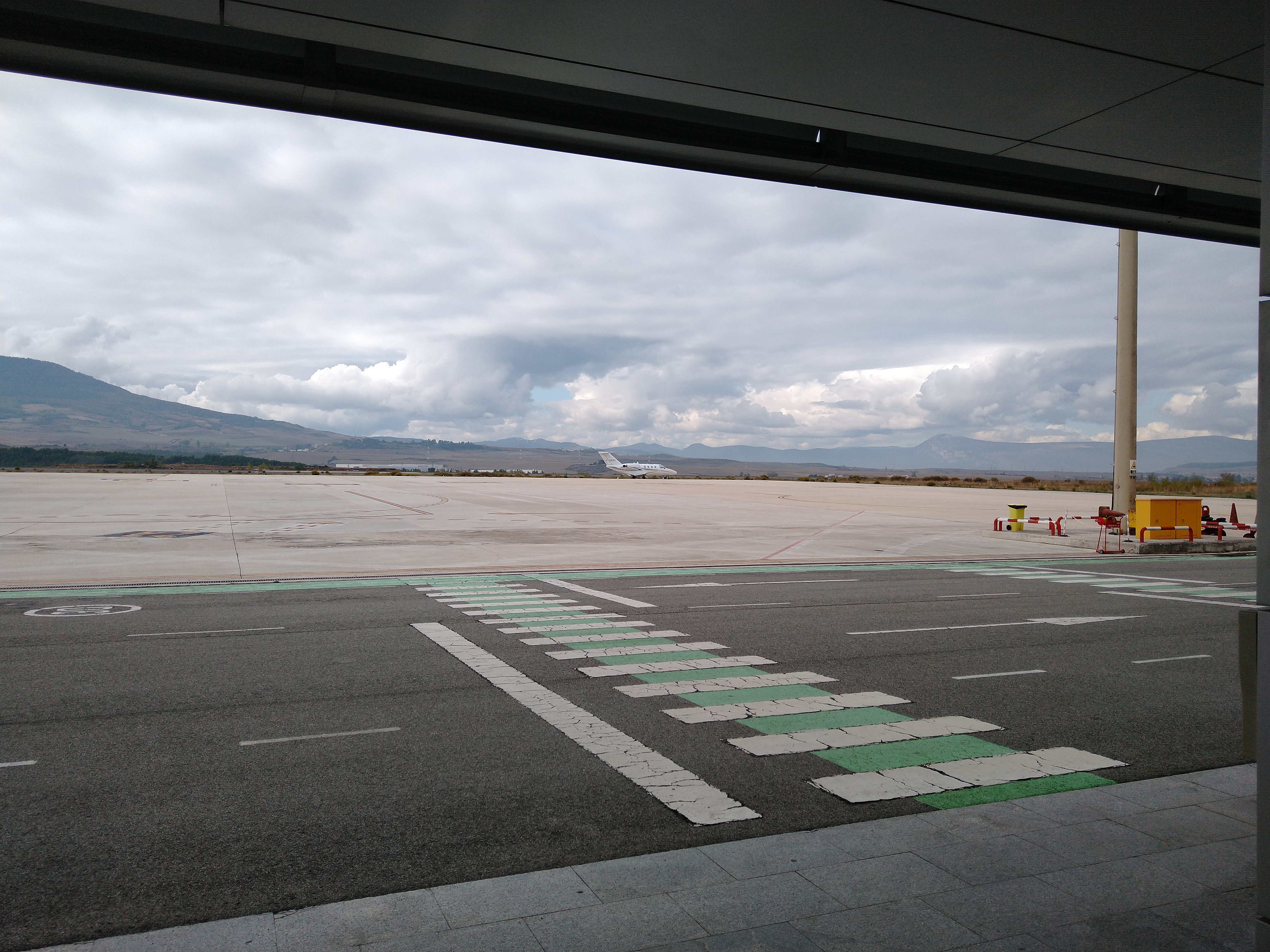 F-HAG Aeropuerto de Pamplona